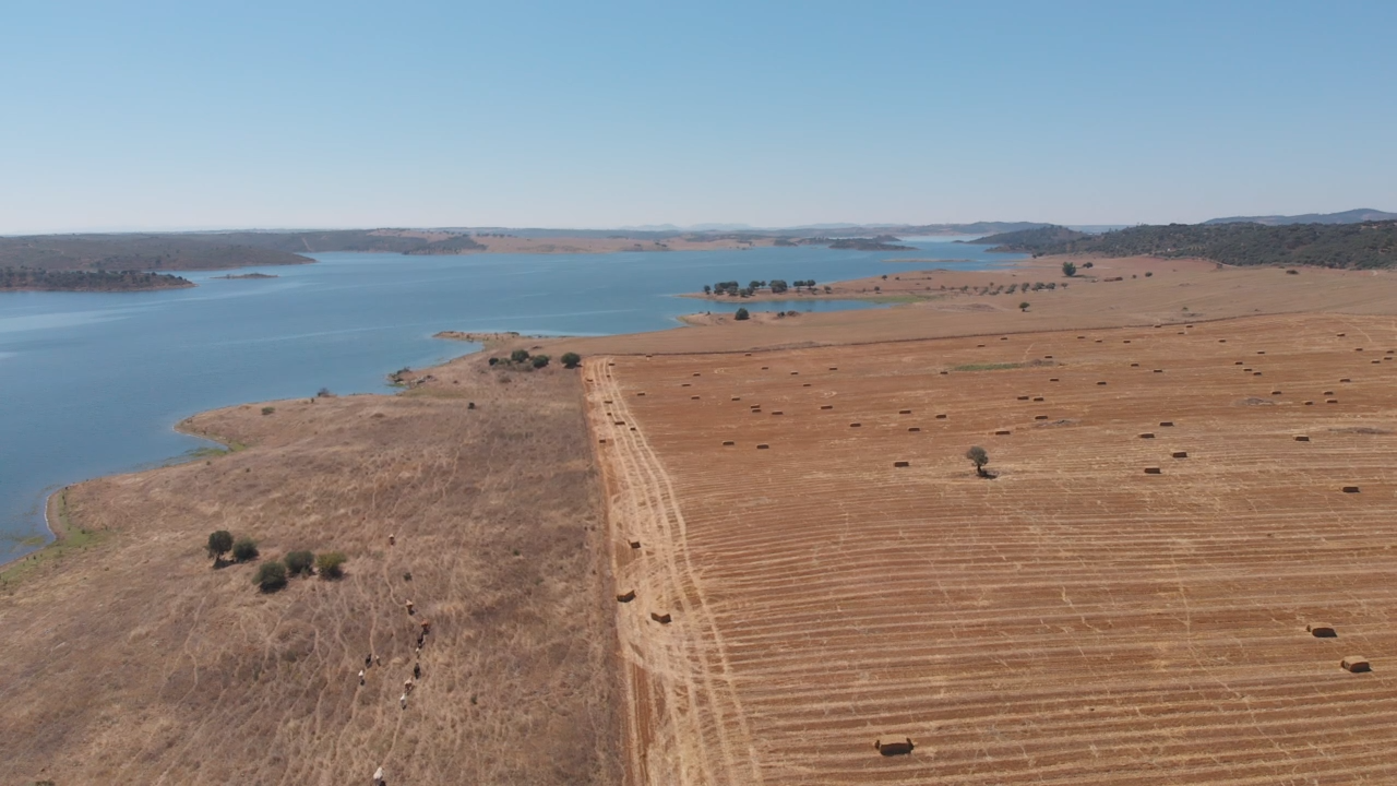 Vue du lac Alqueva depuis un champ